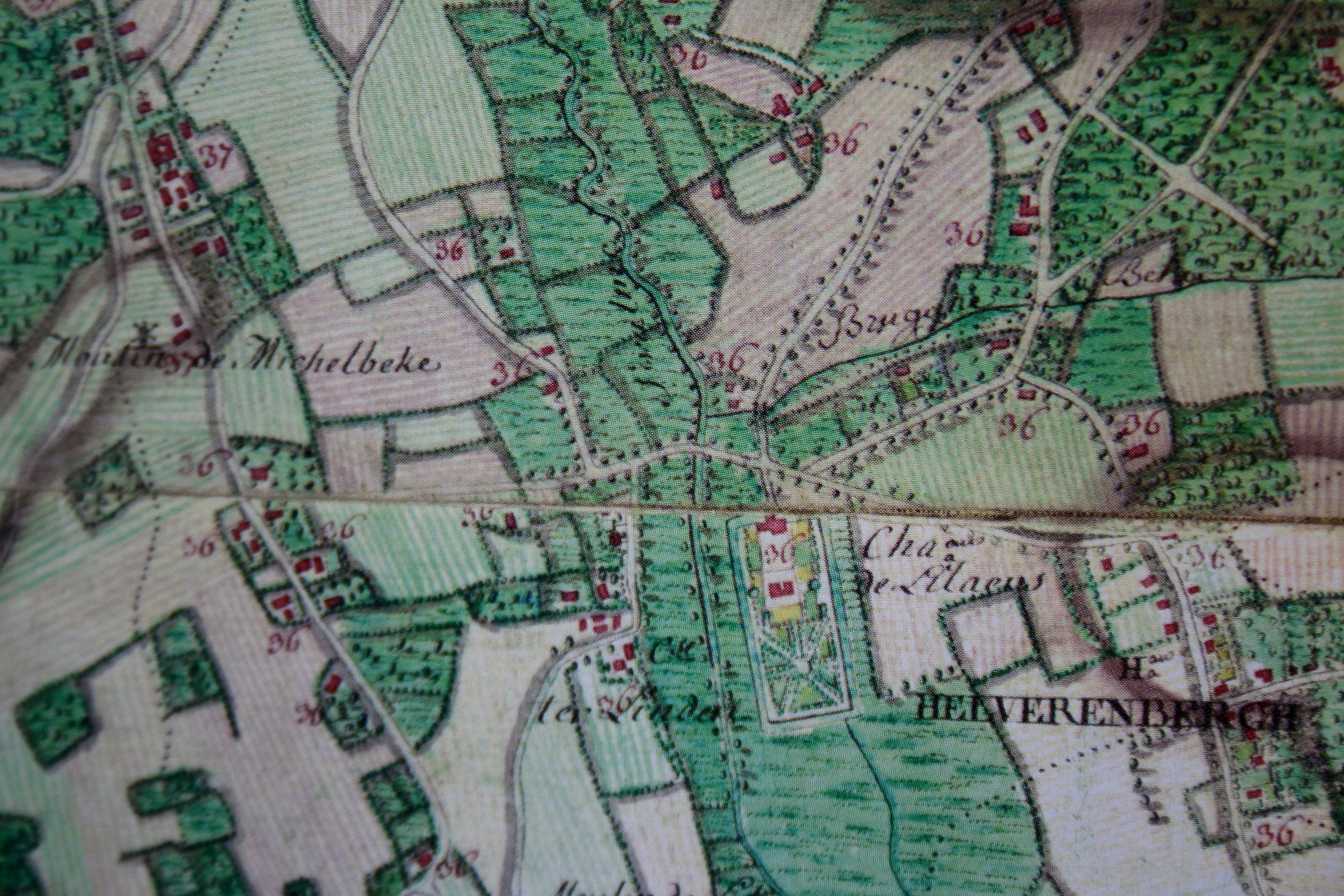 Kasteel van Lilare, Ferrariskaart, 1777.